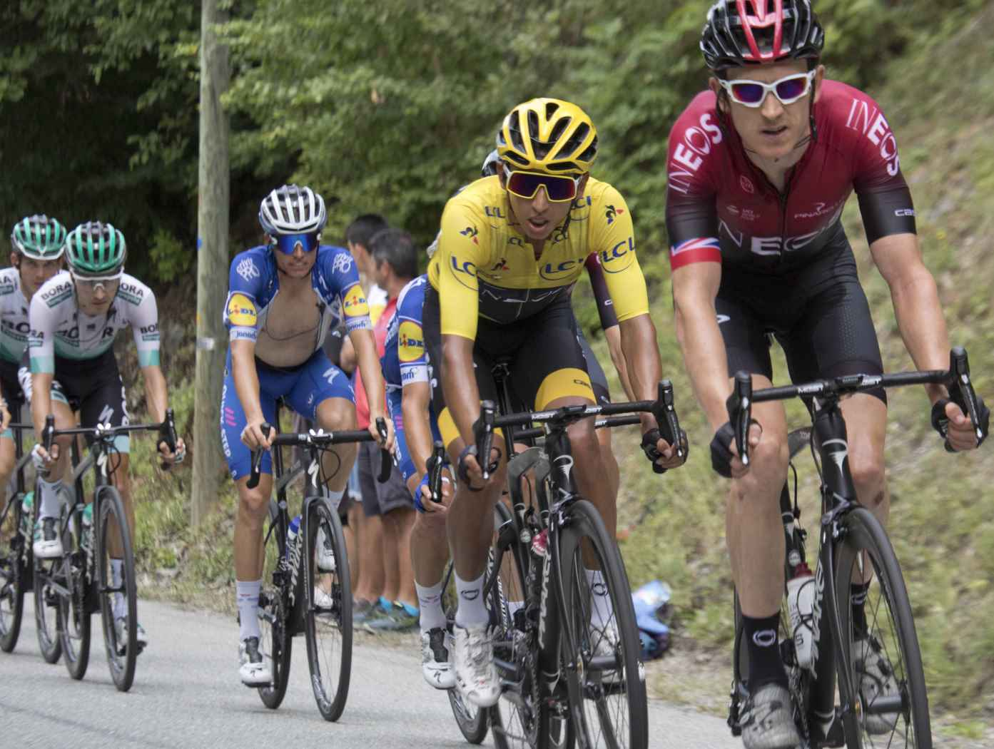 ALP20236 favorietengroep